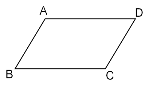 Paralelogramos